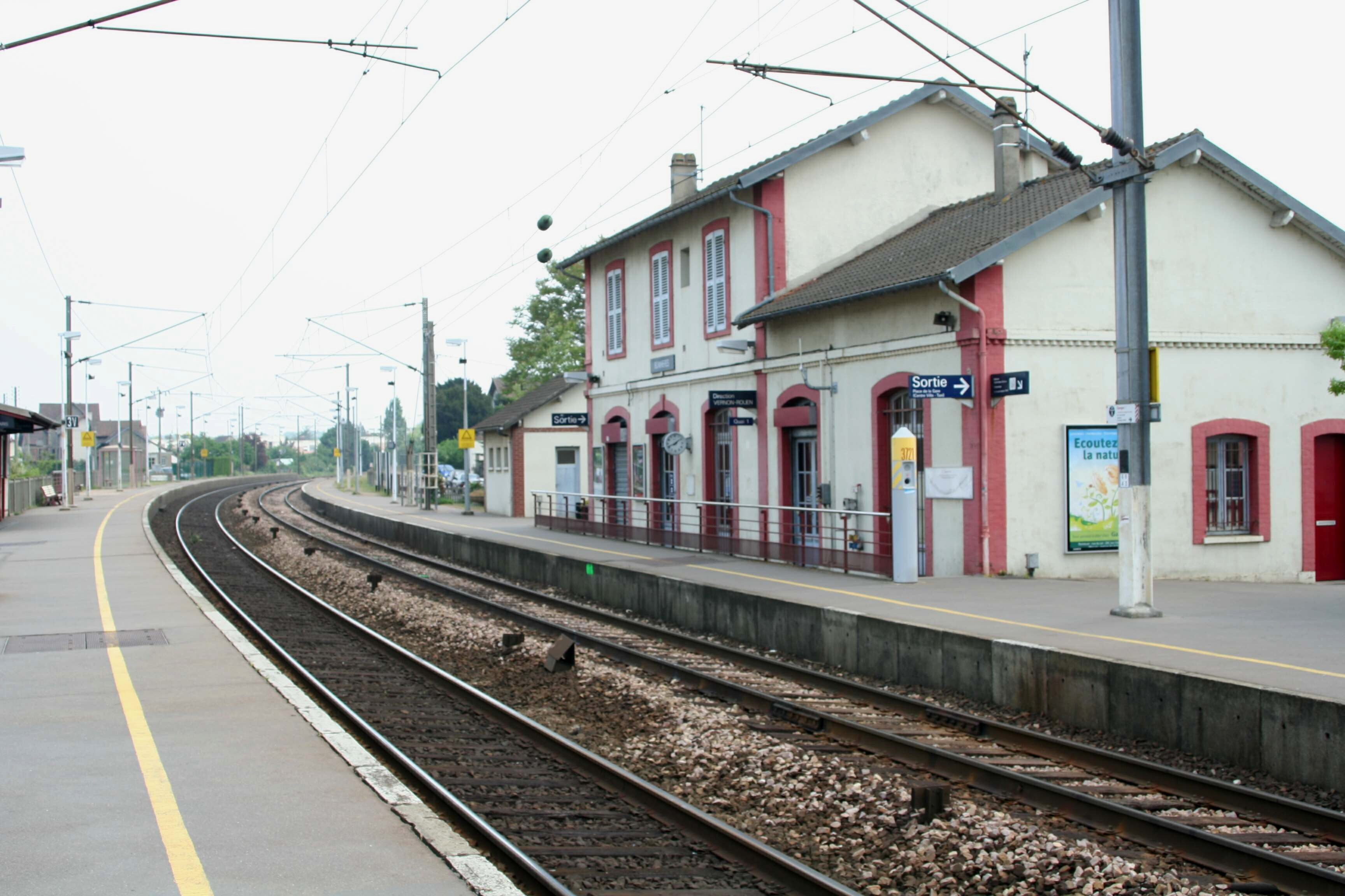 Gare de Bonnières-sur-Seine - Yvelines (France)